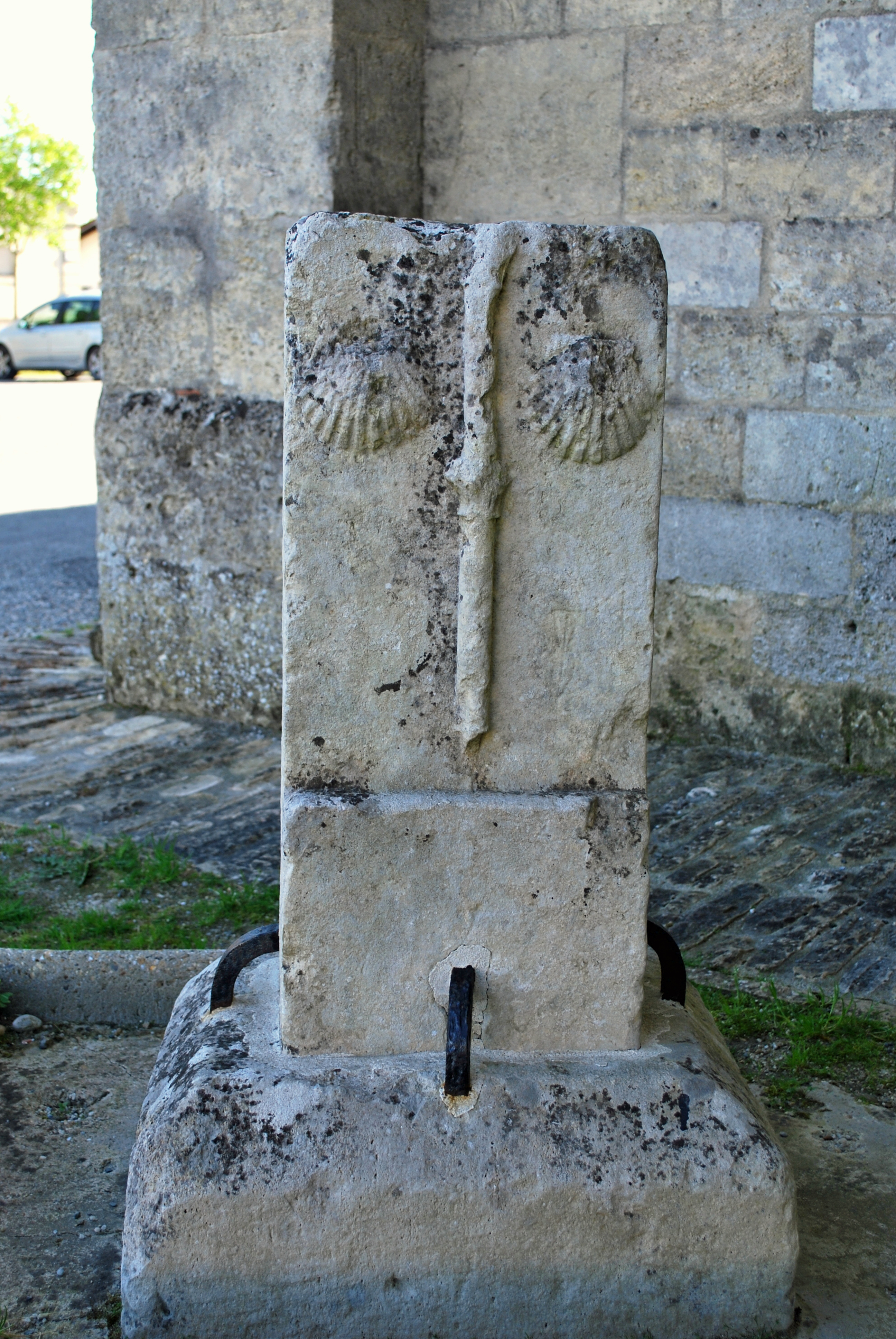 Cadaujac église Borne des pèlerins de St Jacques de Compostelle